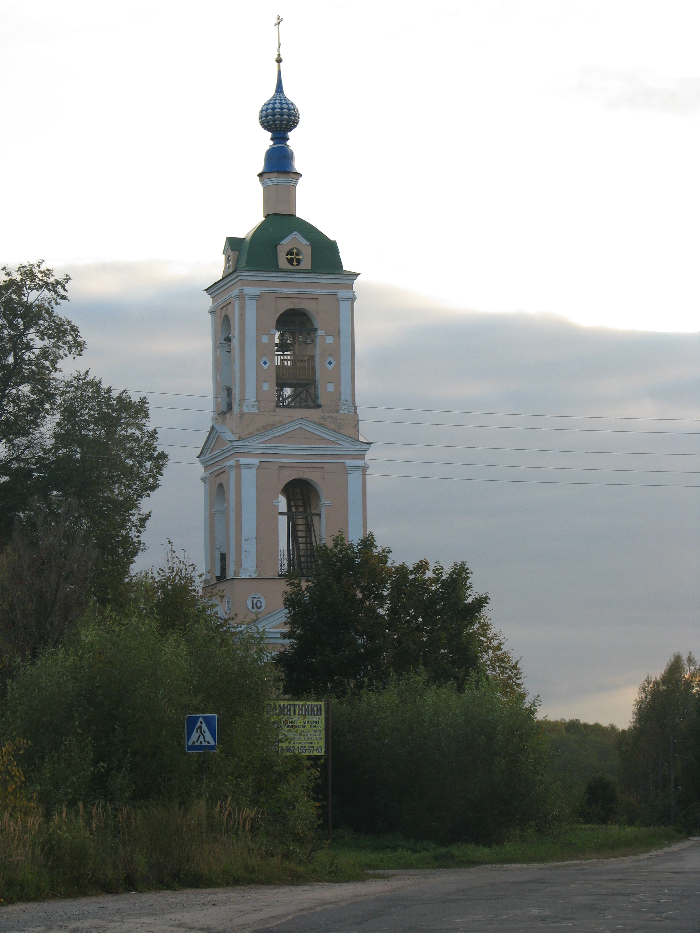 Колокольня Казанской церкви: Якиманна, Шуйский район, Ивановская область